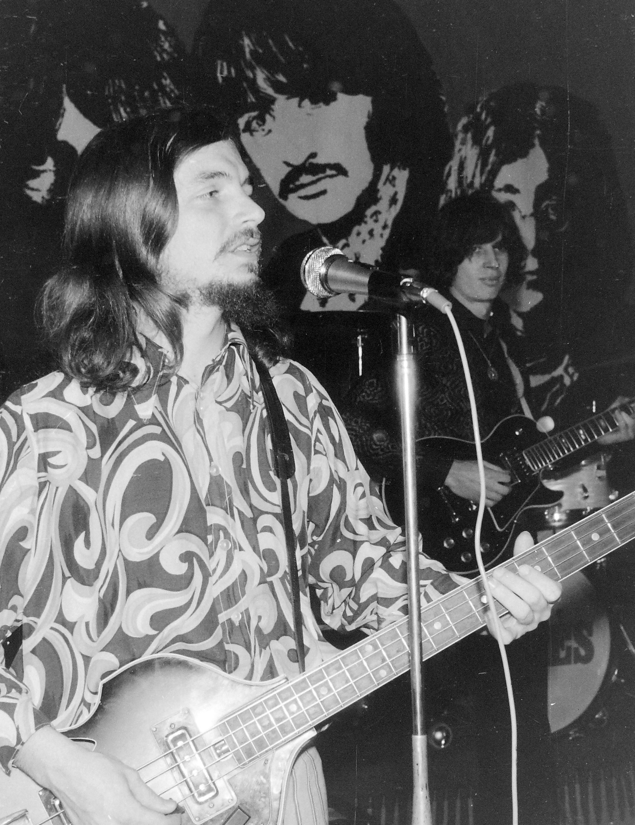 Szörényi Szabolcs (Budapest, 1943. szeptember 26. – ) Kossuth-díjas magyar énekes, basszusgitáros, zeneszerző, Szörényi Levente testvérbátyja. Számtalan dal szerzője. Fellépés ismeretlen helyszínen